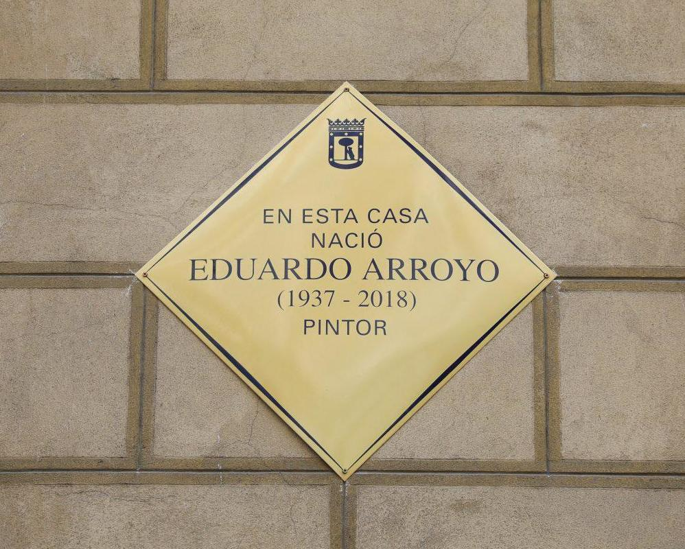 La alcaldesa en funciones de Madrid, Manuela Carmena, ha asistido hoy miércoles, 29 de mayo, al descubrimiento de una placa dedicada al pintor y escultor madrileño Eduardo Arroyo (1937-2018) en la casa donde nació, situada en la calle Argensola, El acto ha contado con la presencia de la viuda de Arroyo, Isabel Azcárate, y el experto en gestión cultural, Alberto Anaut, así como de numerosos familiares y amigos del artista.